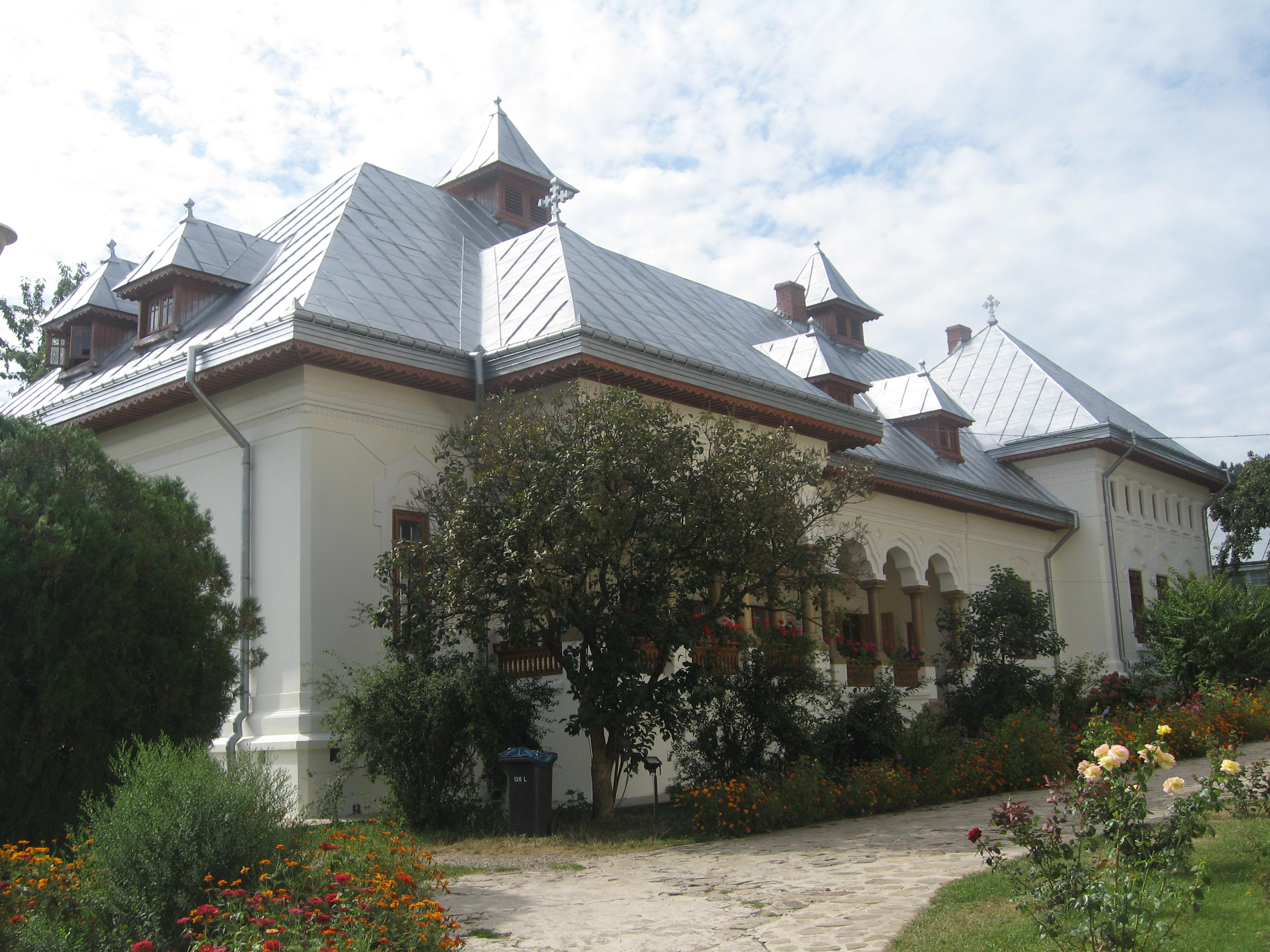 Mănăstirea Văratec